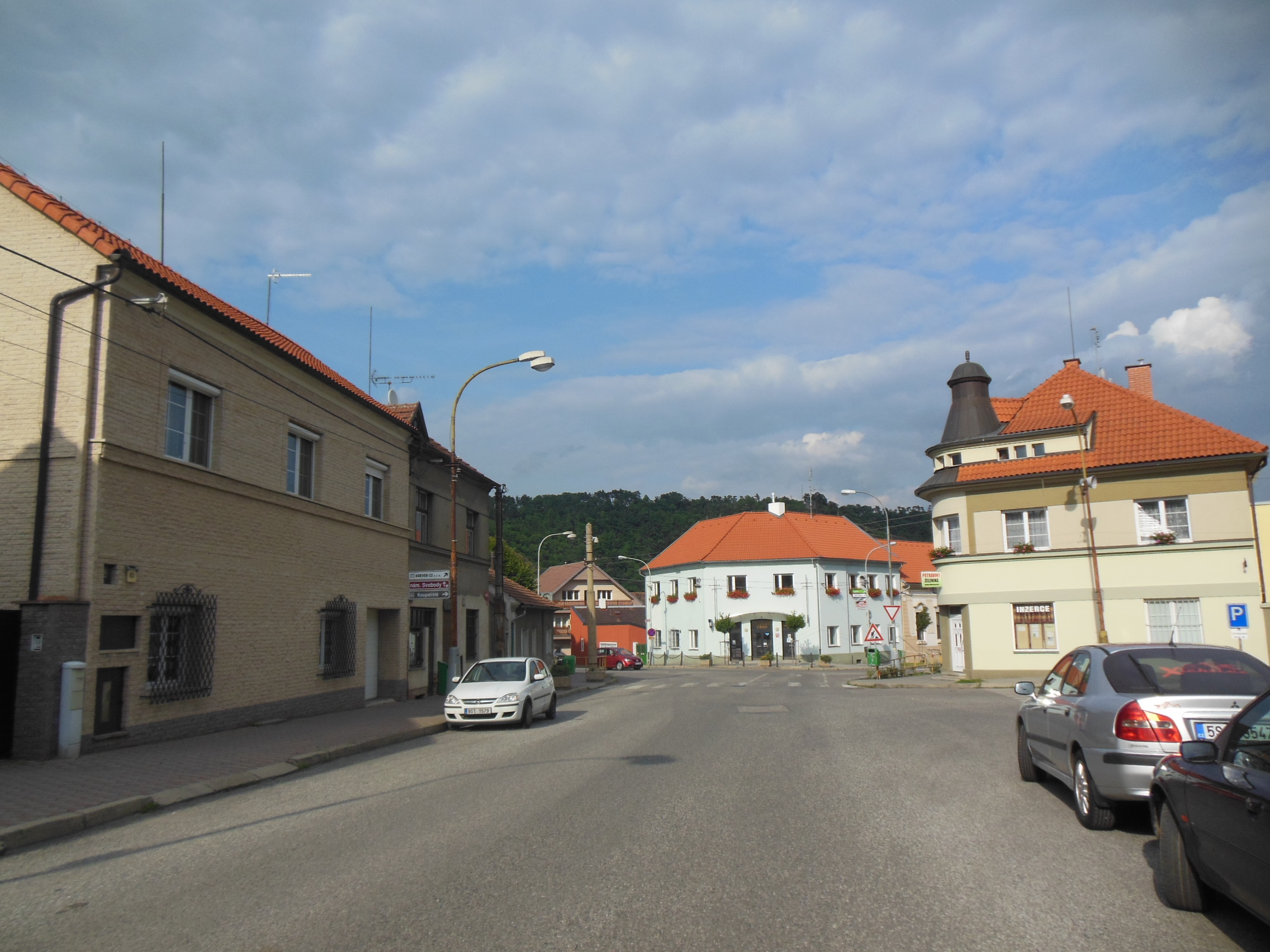 Pohled z ulice Chýnovská na náměstí Svobody v Libčicích nad Vltavou (okr. Praha-západ).